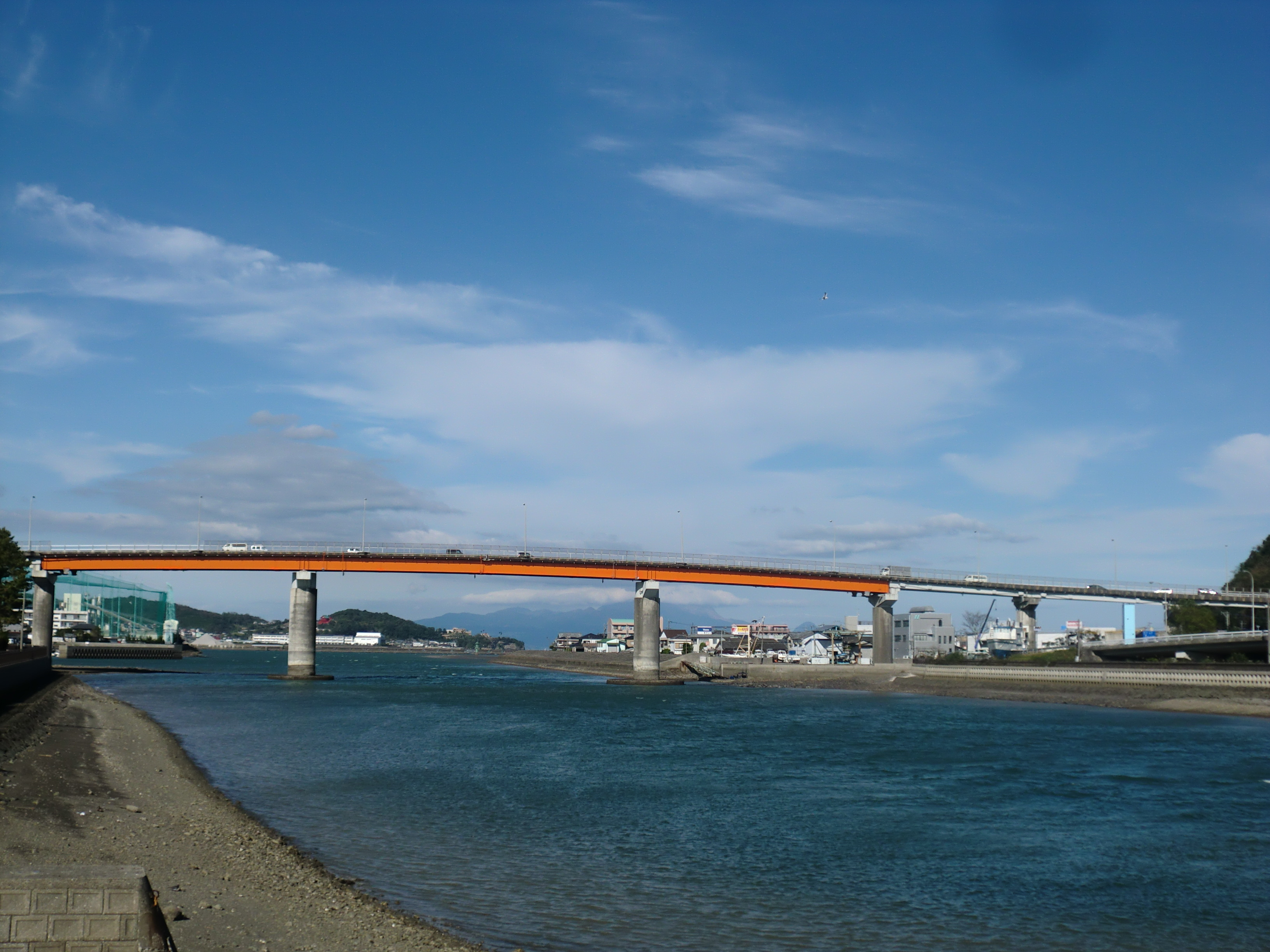 熊本県天草市にある天草瀬戸大橋